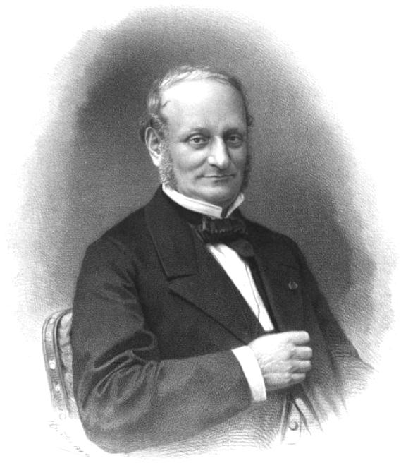 Louis Wolowski